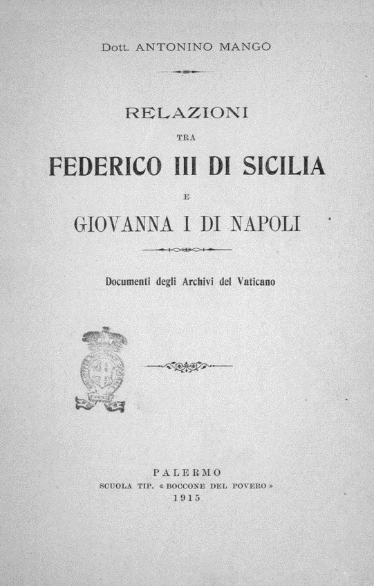 Frontespizio